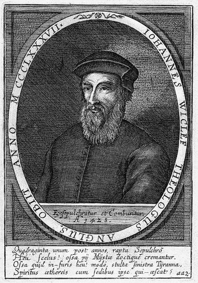 John Wyclif